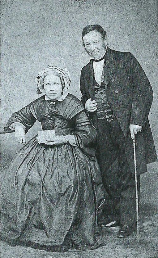 Portret van de schilder Martinus Savrij (1793-1871) en zijn tweede echtgenote Cornelia Johanna Bouwmeester (1804-1865)